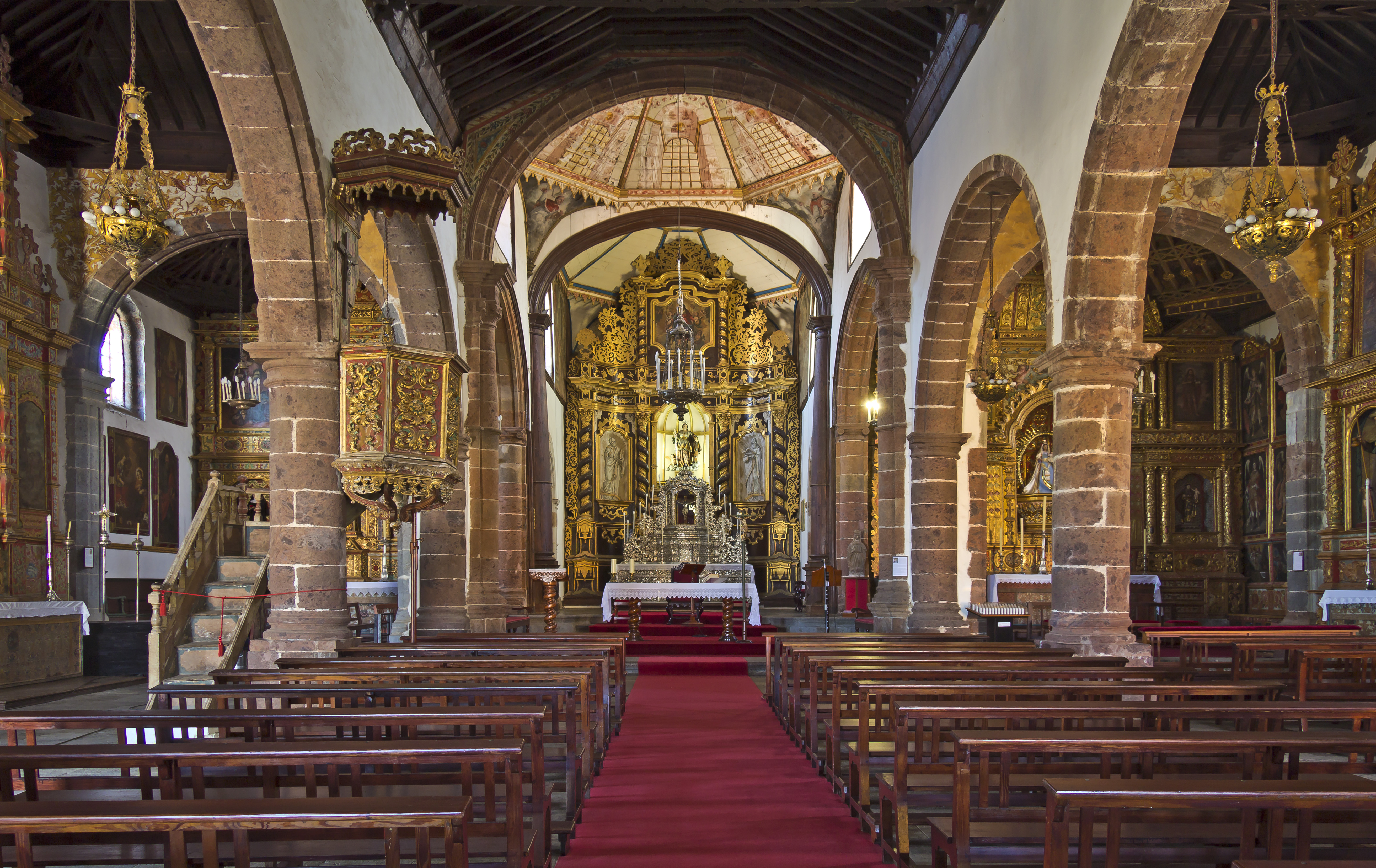 Innenraum der Kirche Santa Catalina in Tacoronte (Teneriffa)